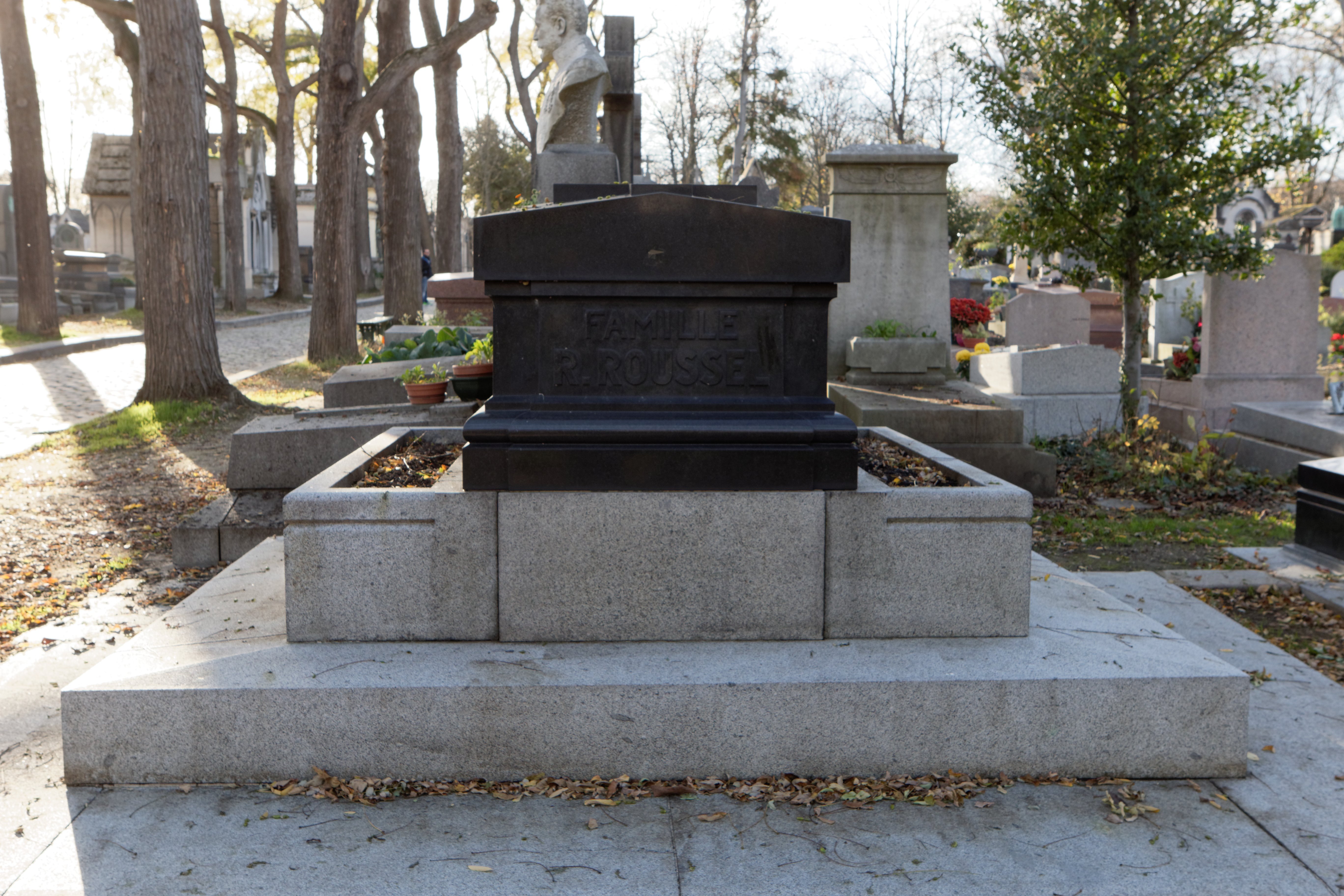 Sépulture de Raymond Roussel (1877-1933), écrivain, dramaturge et poète.